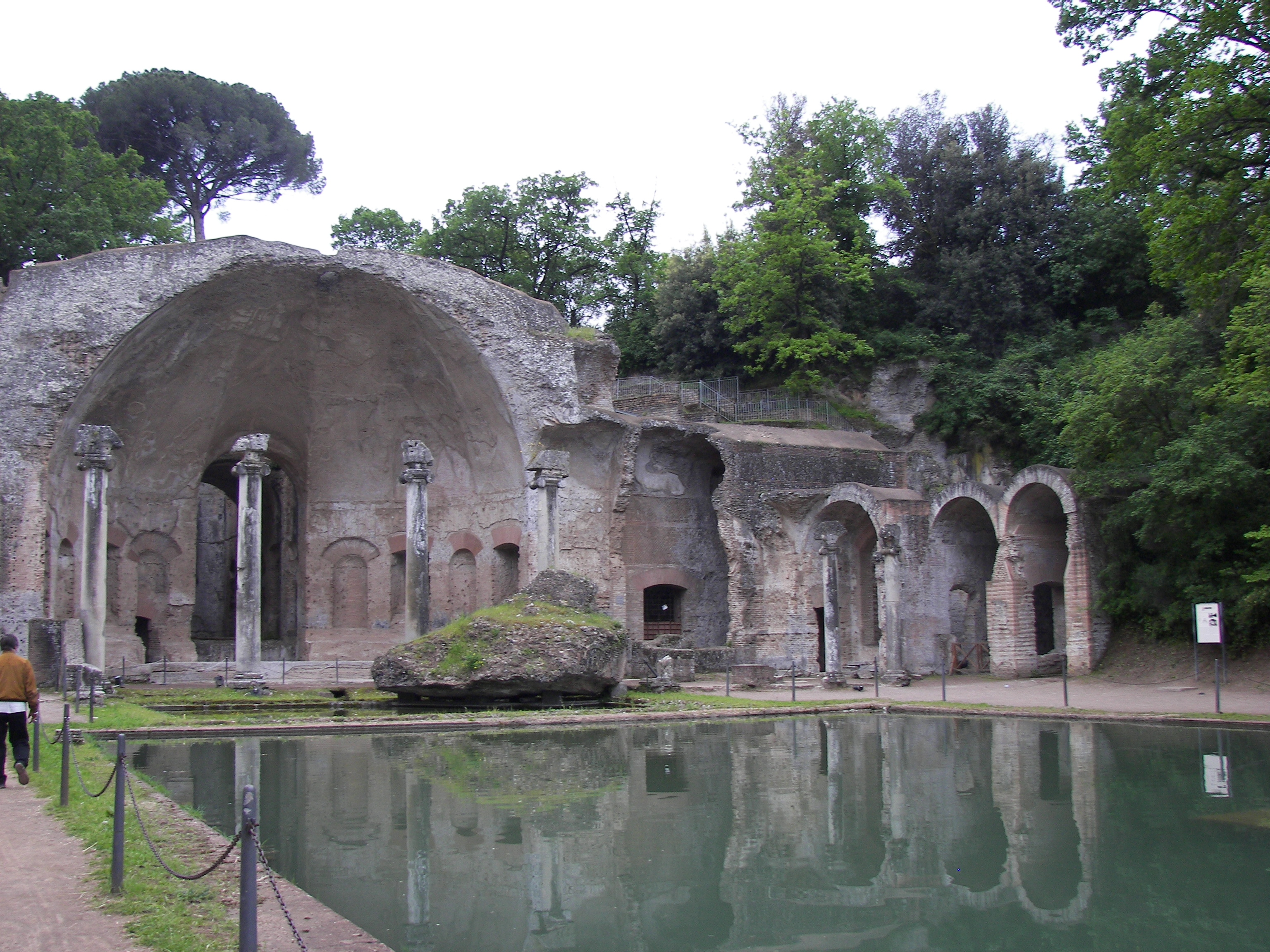 Canopo in Villa Adriana, Tivoli.